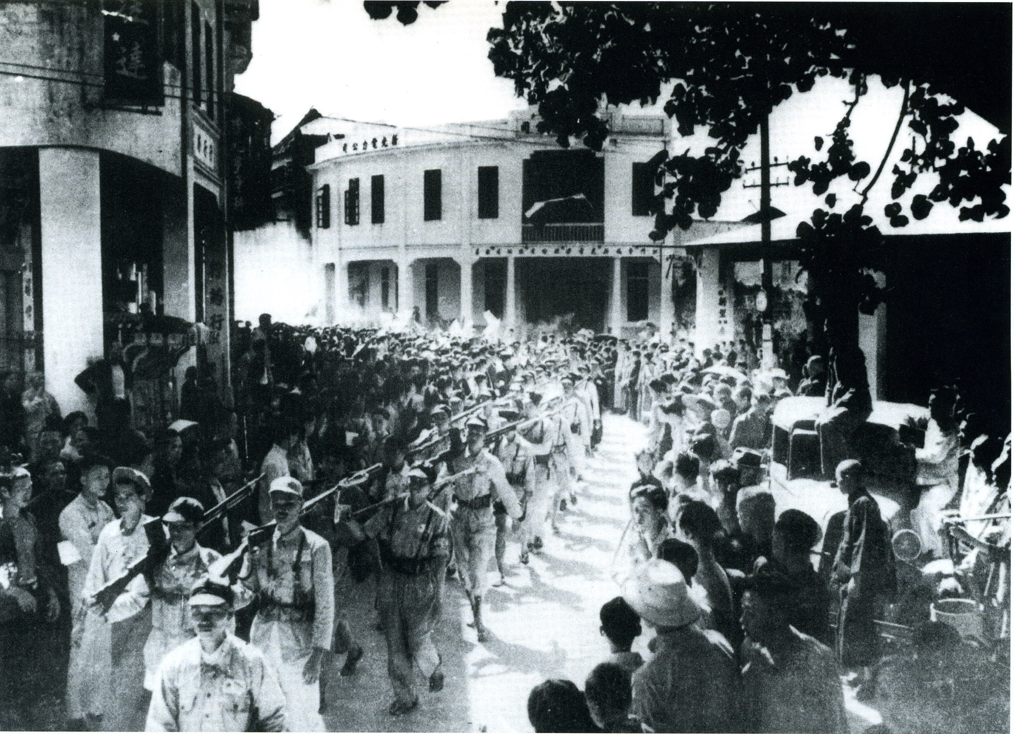 中国人民解放军粤中纵队进入江门时情形